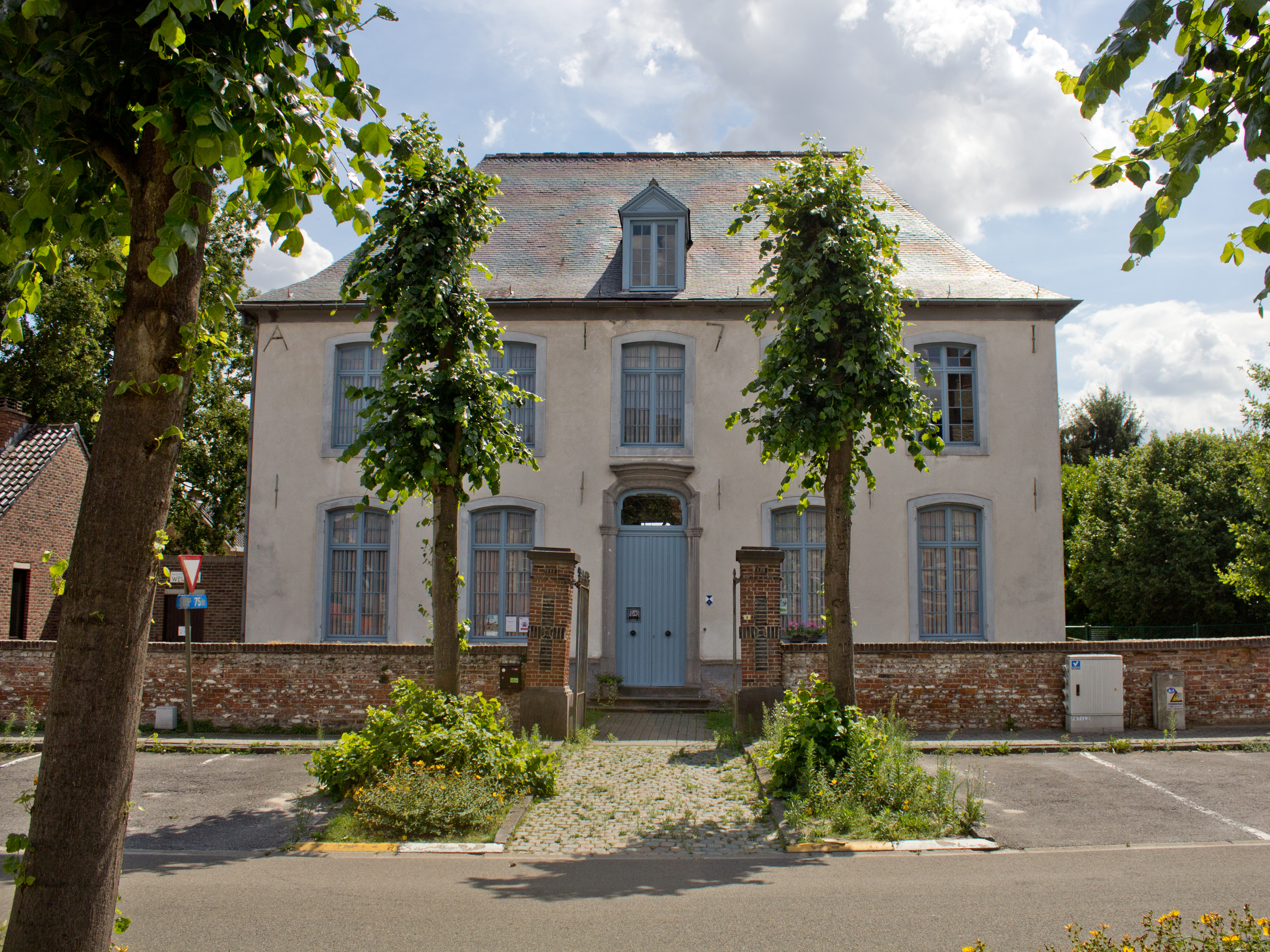 Pastorie, Tildonk.